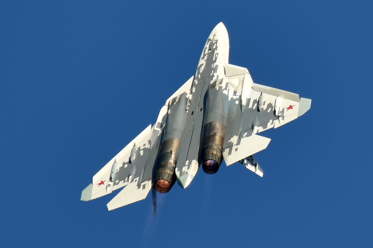 Sukhoi Design Bureau, 054, Sukhoi Su-57